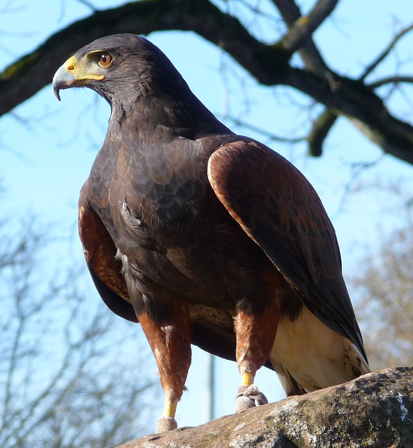 (? Weiblicher) Wüstenbussard Parabuteo unicinctus